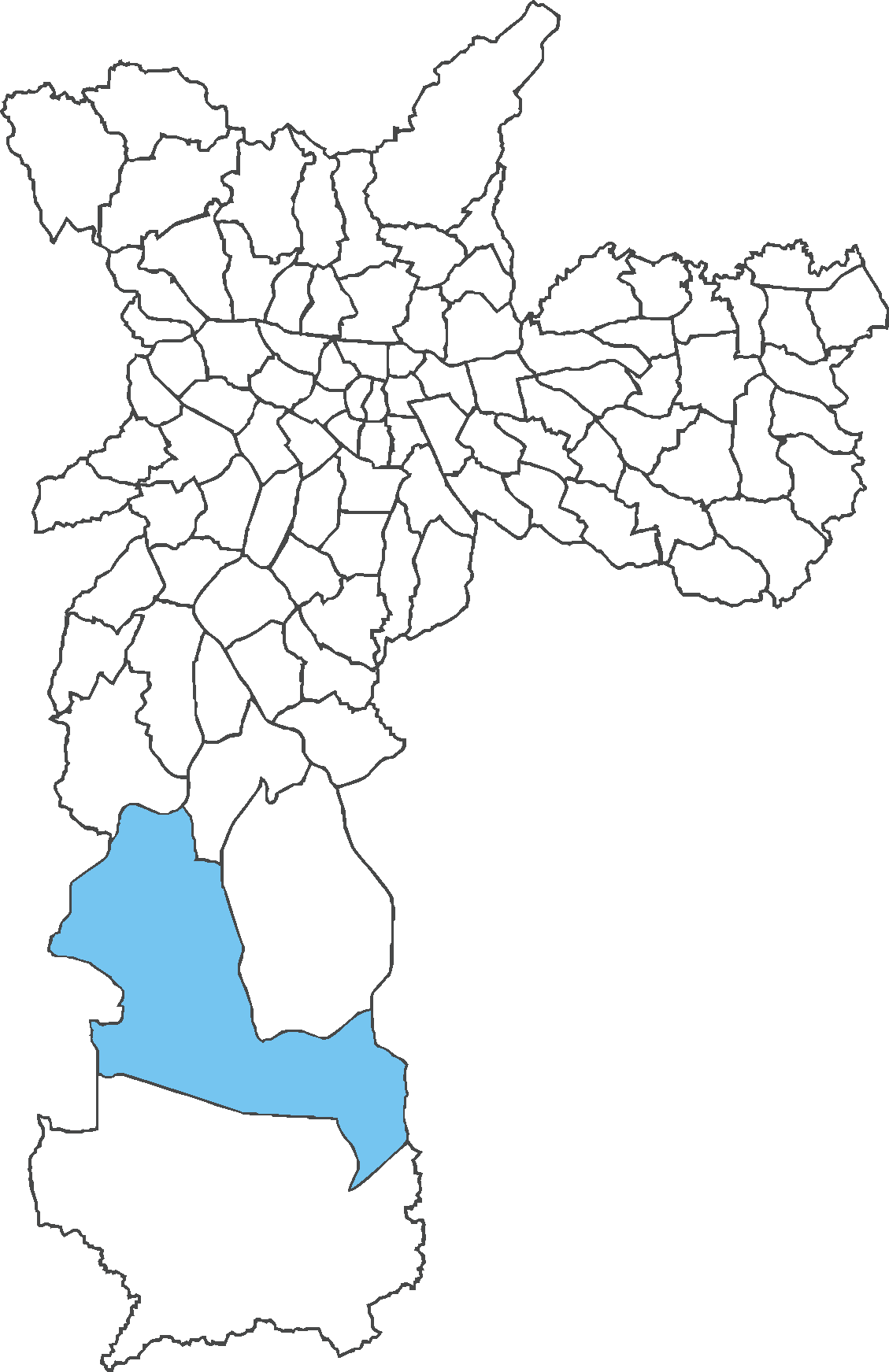 Localização do distrito de Parelheiros no município de São Paulo.